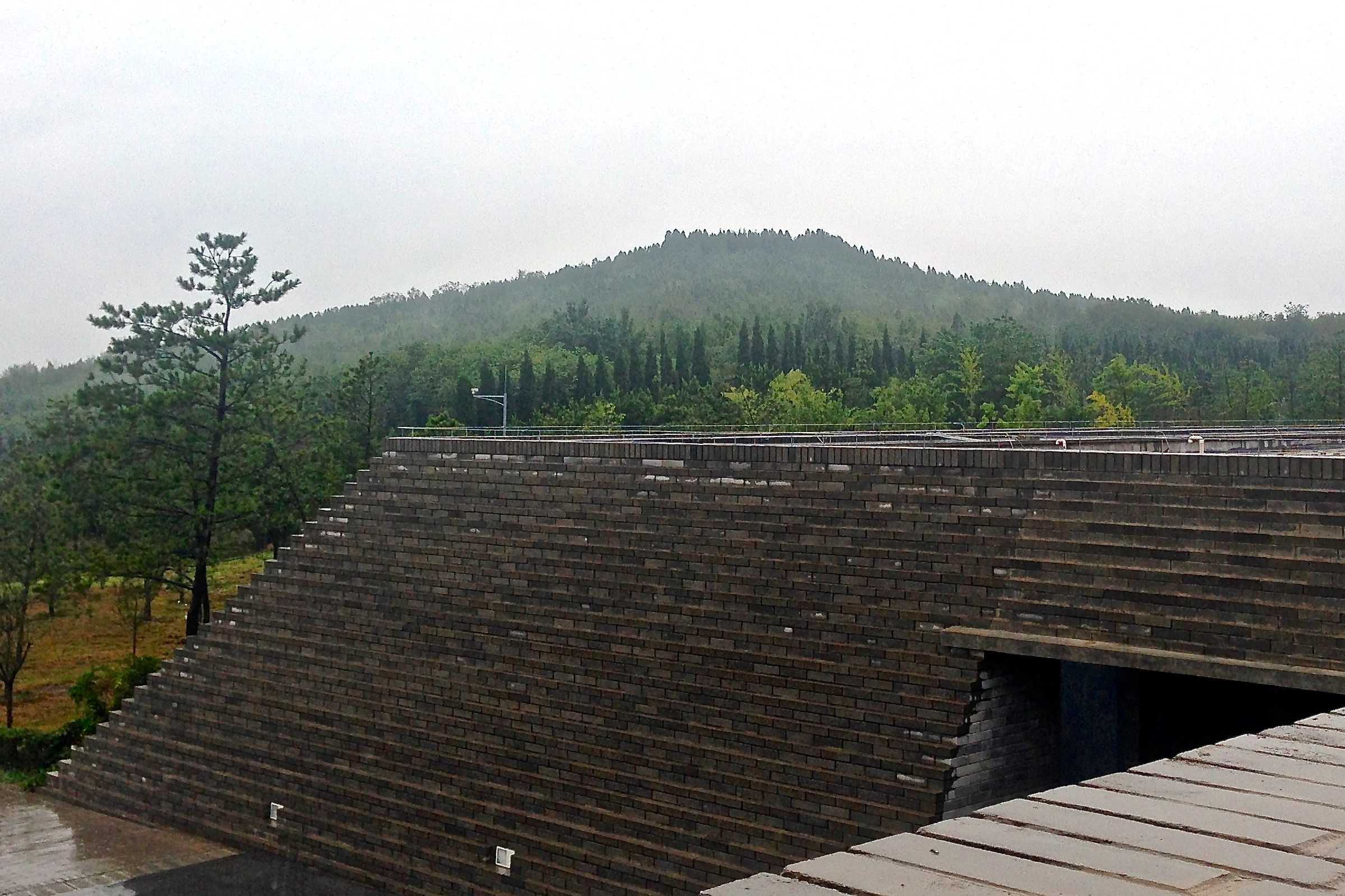 Qin Shi Huangdis gravpyramid i bakgrunden och Grop K0006 i fögrunden